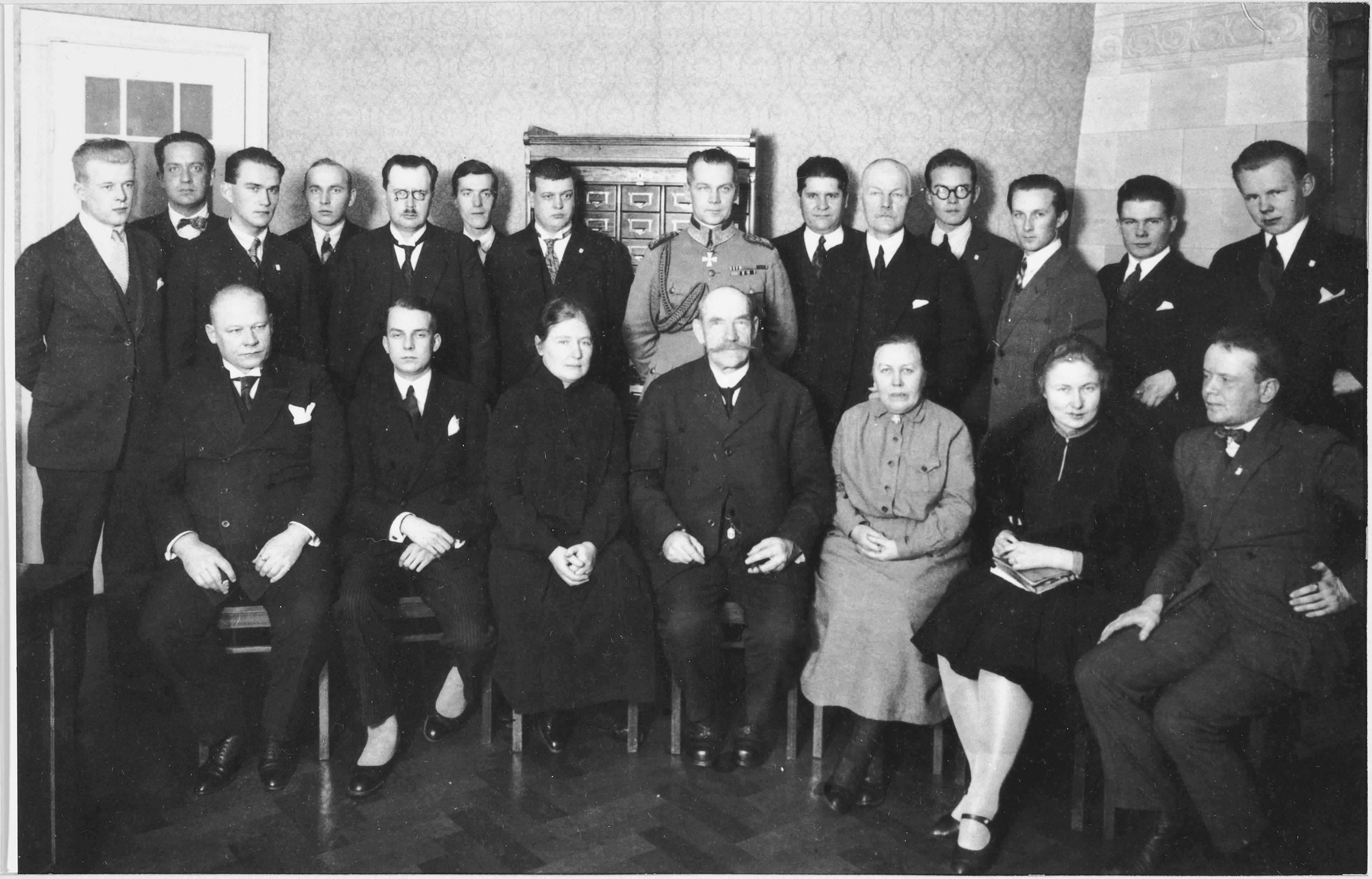 Presidentti Svinhufvud vierailulla Itsenäisyyden liitossa 15.11.1927